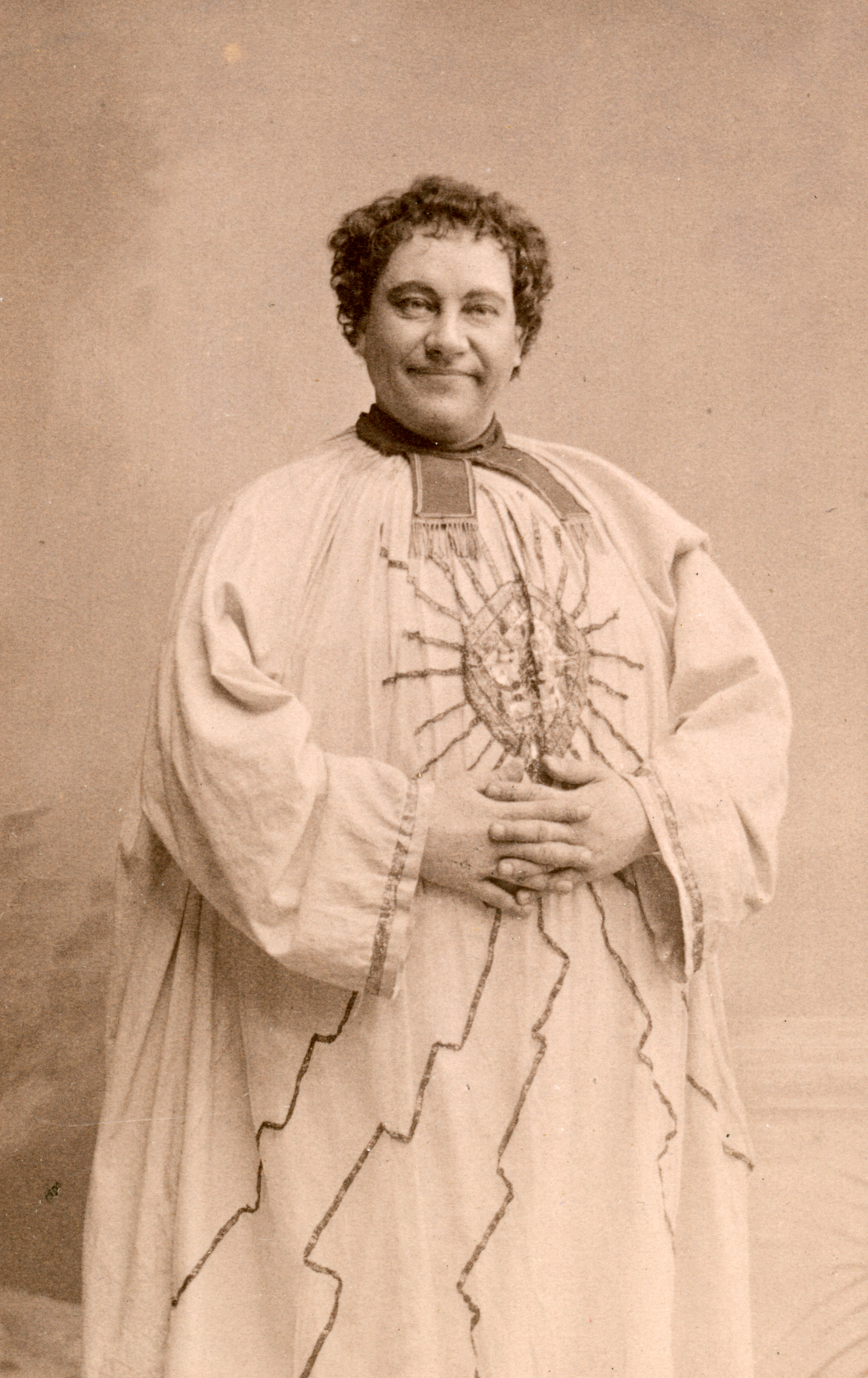 Gründer, Mauritz Gabriel (1855-1897) som Calchas i Den sköna Helena = La belle Hélène, Vasateatern 1888